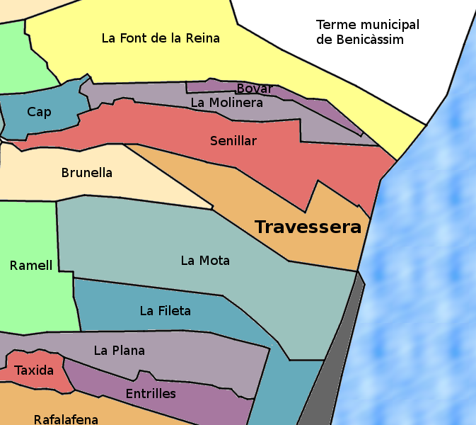 Cròquis de la situació de la Partida de Travessera al Terme Municipal de Castelló de La Plana.